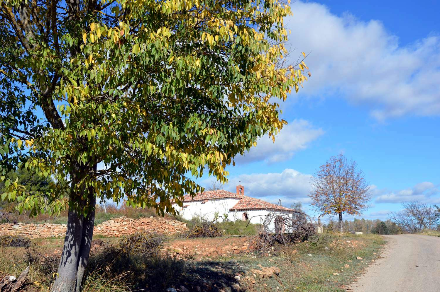 Vista general (meridional) de la ermita de san José, Torrebaja.